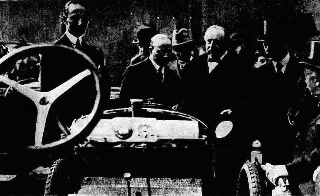 André Citroen en 1921 au salon de l'automobile devant sa type A, recevant le ministre du commerce Dior.